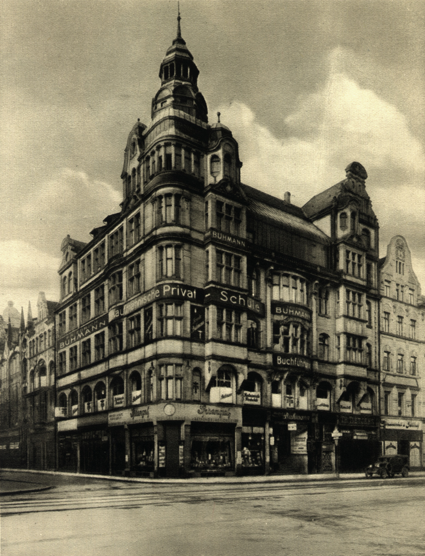 Das Gebäude in der Georgstraße/Ecke Große Packhofstraße 16 (heutige Hausnummer: 22) nutzte die von Friedrich Buhmann 1907 gegründete Dr. Buhmann Schule anfangs mit zwei Klassenräumen. Nach Abfindung seines Geschäftspartners Wilhelm Herold führte Friedrich Buhmann ab 1912 die Handelsschule alleine weiter. Schießlich diente das "Sprengelhaus" als Verkaufsladen des Schokoladenfabrikanten Sprengel im Erdgeschoss.